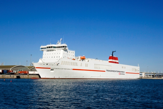 Buque de carga José María Entrecanales